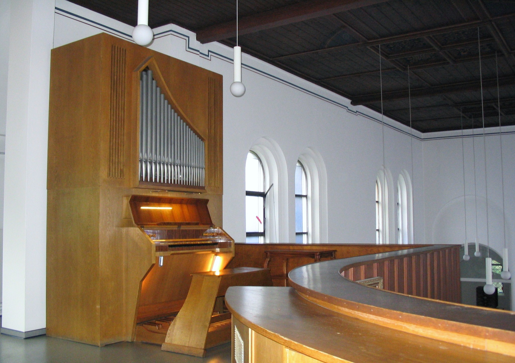 Kreienbrink-Orgel, Kath. Kirche "Zu den heiligen Schutzengeln", Juist